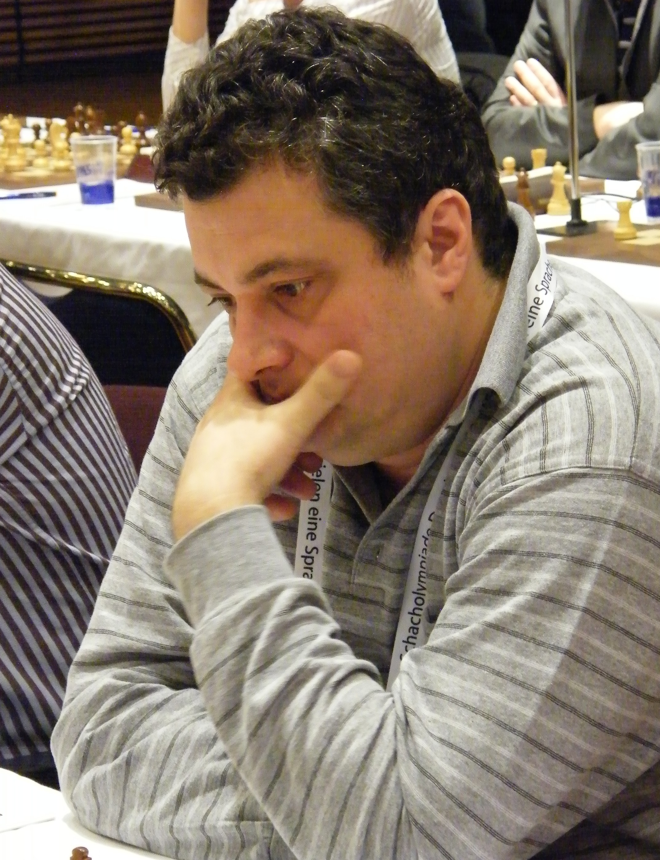 GM Dragan Kosic bei der Schacholympiade 2008 in Dresden